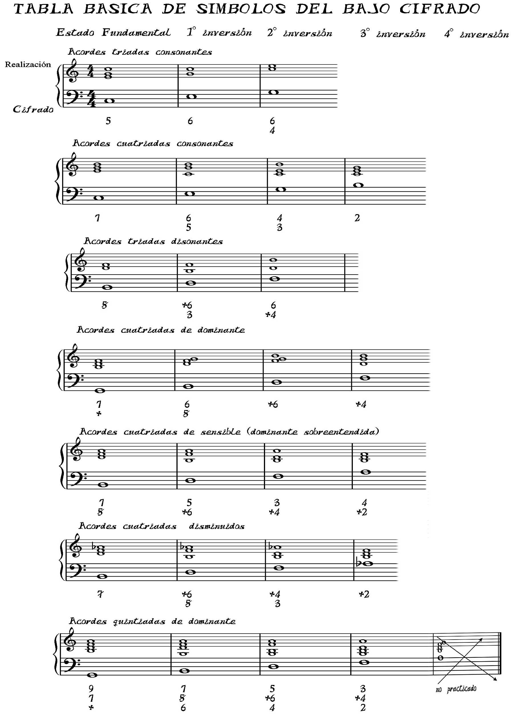 Tabla de interpretación y ejecución del sistema de notación musical denominado bajo cifrado